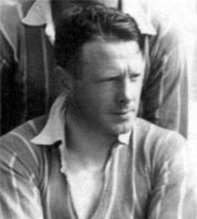 Henry Welfare - jogador 1913